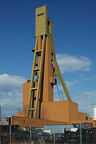 Germany Bergkamen Fördergerüst "Neu Monopol"